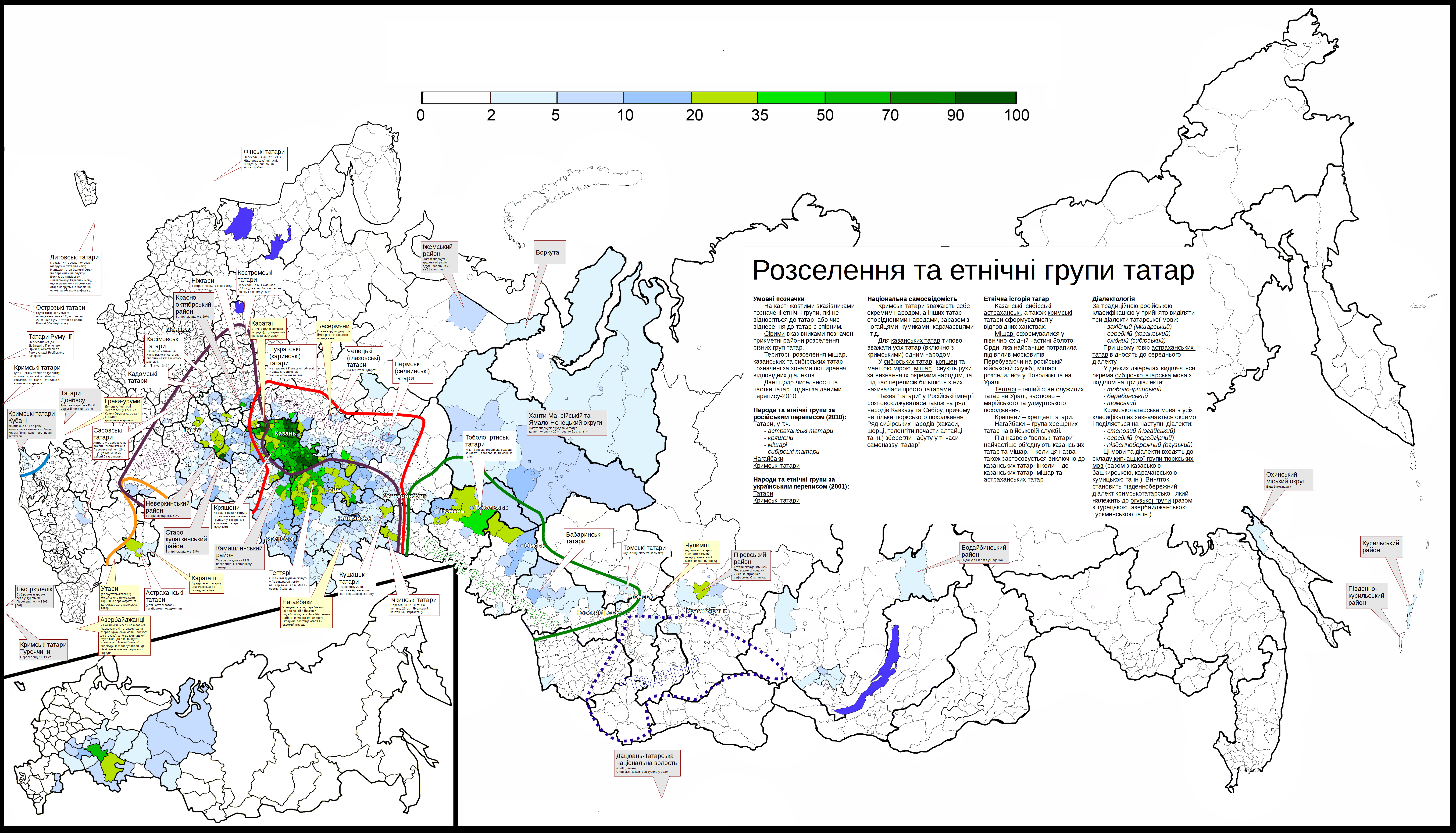 Розселення та етнічні групи татар